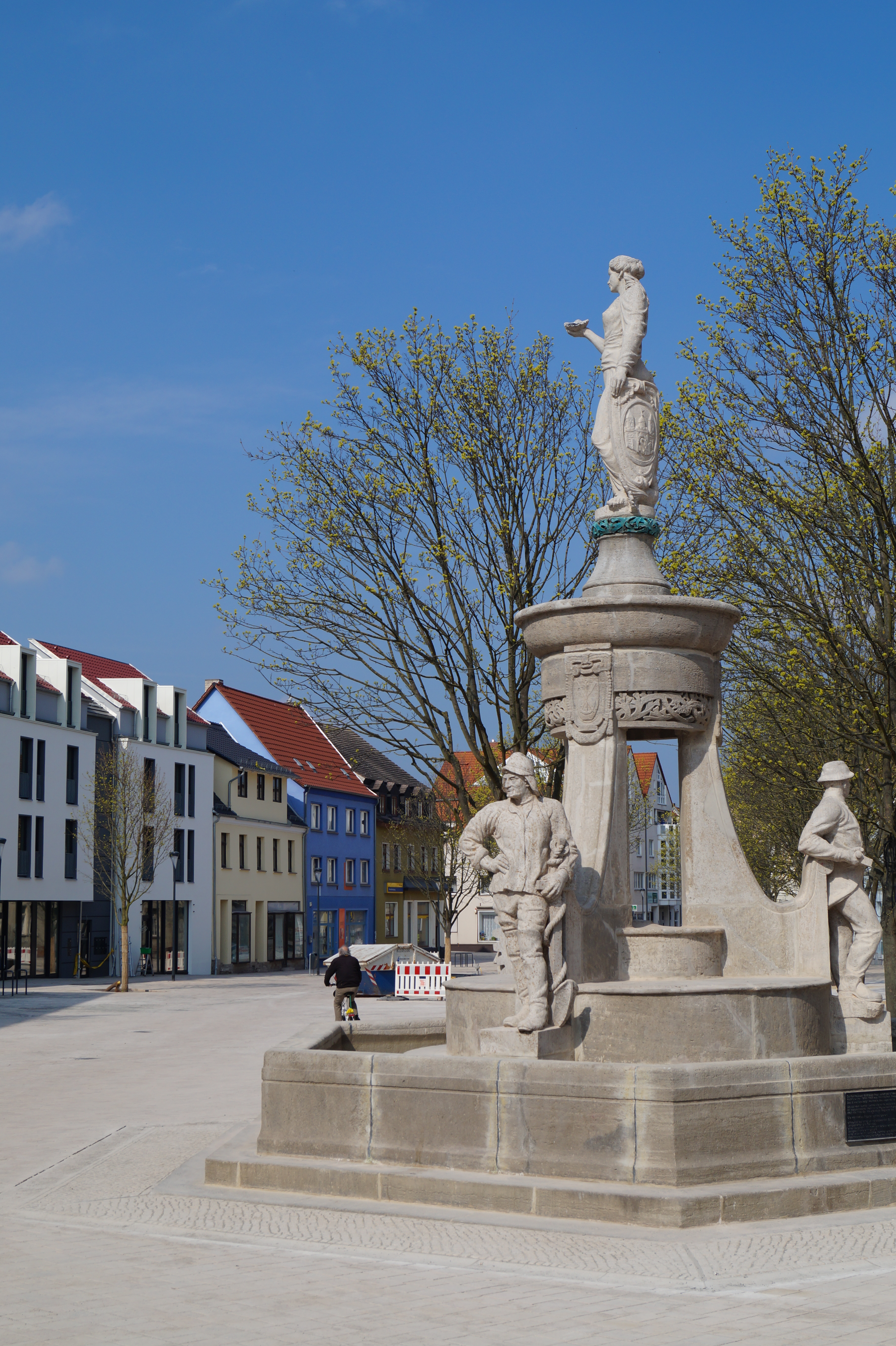 Der Brunnen wurde am 6. September 1908 der Öffentlichkeit übergeben, 2014 restauriert und 2015 wieder aufgestellt.